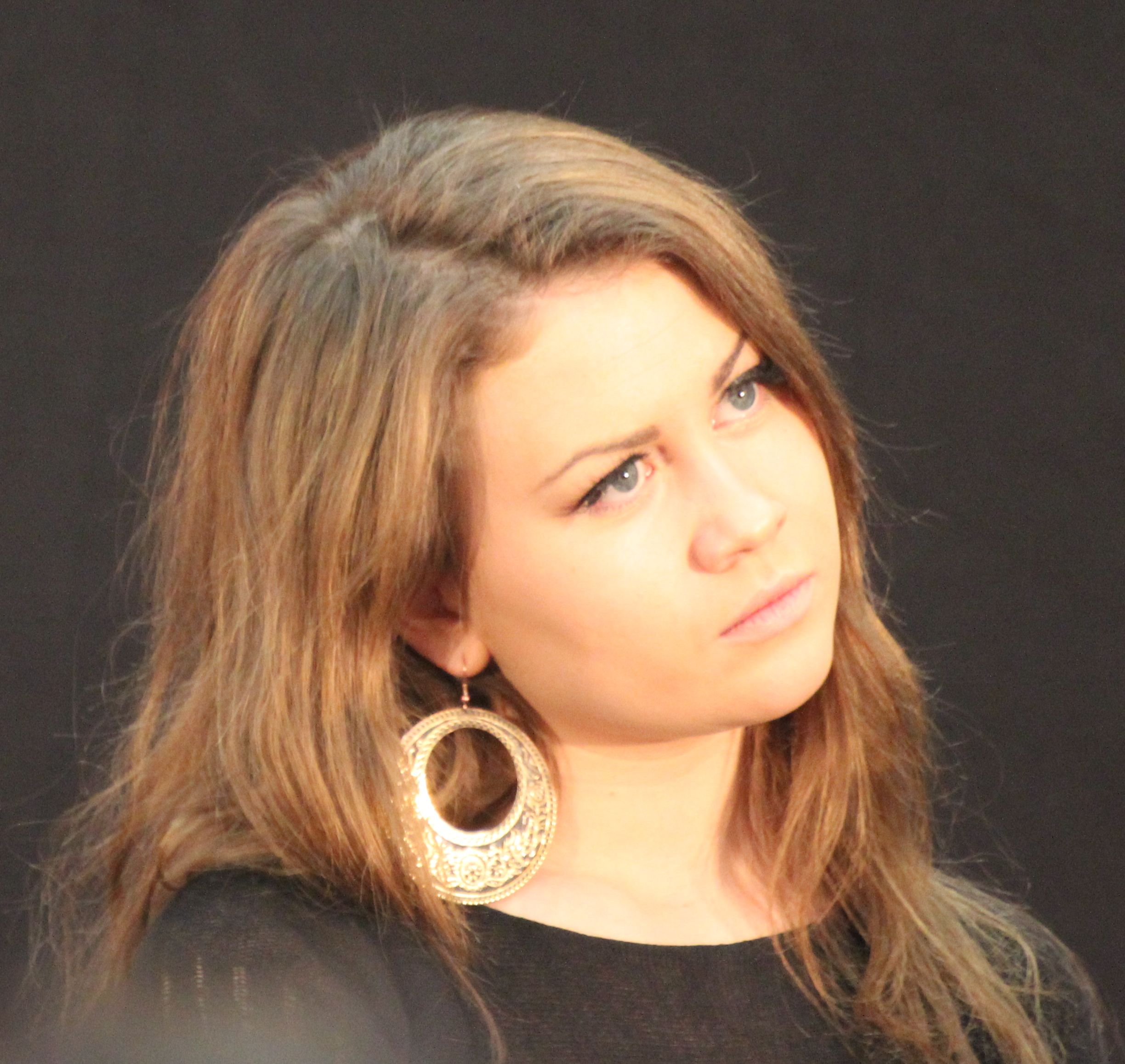 Elina Born esinemas Kristiine keskuses.